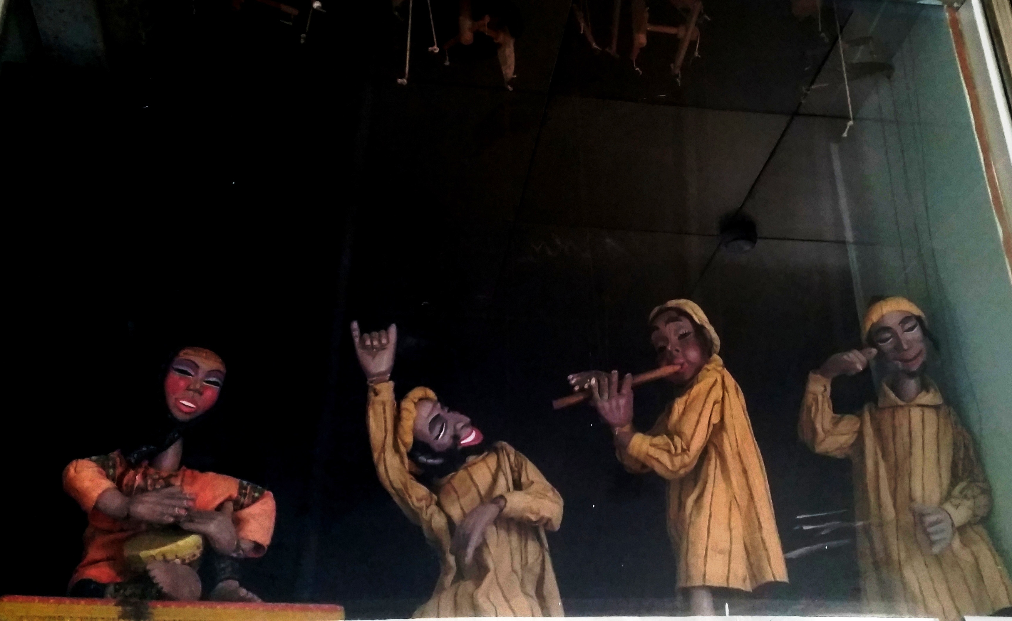 בובות "הבובטרון של הונזו" שנבנו ע"פ הסקיצות של אנטול גורביץ'